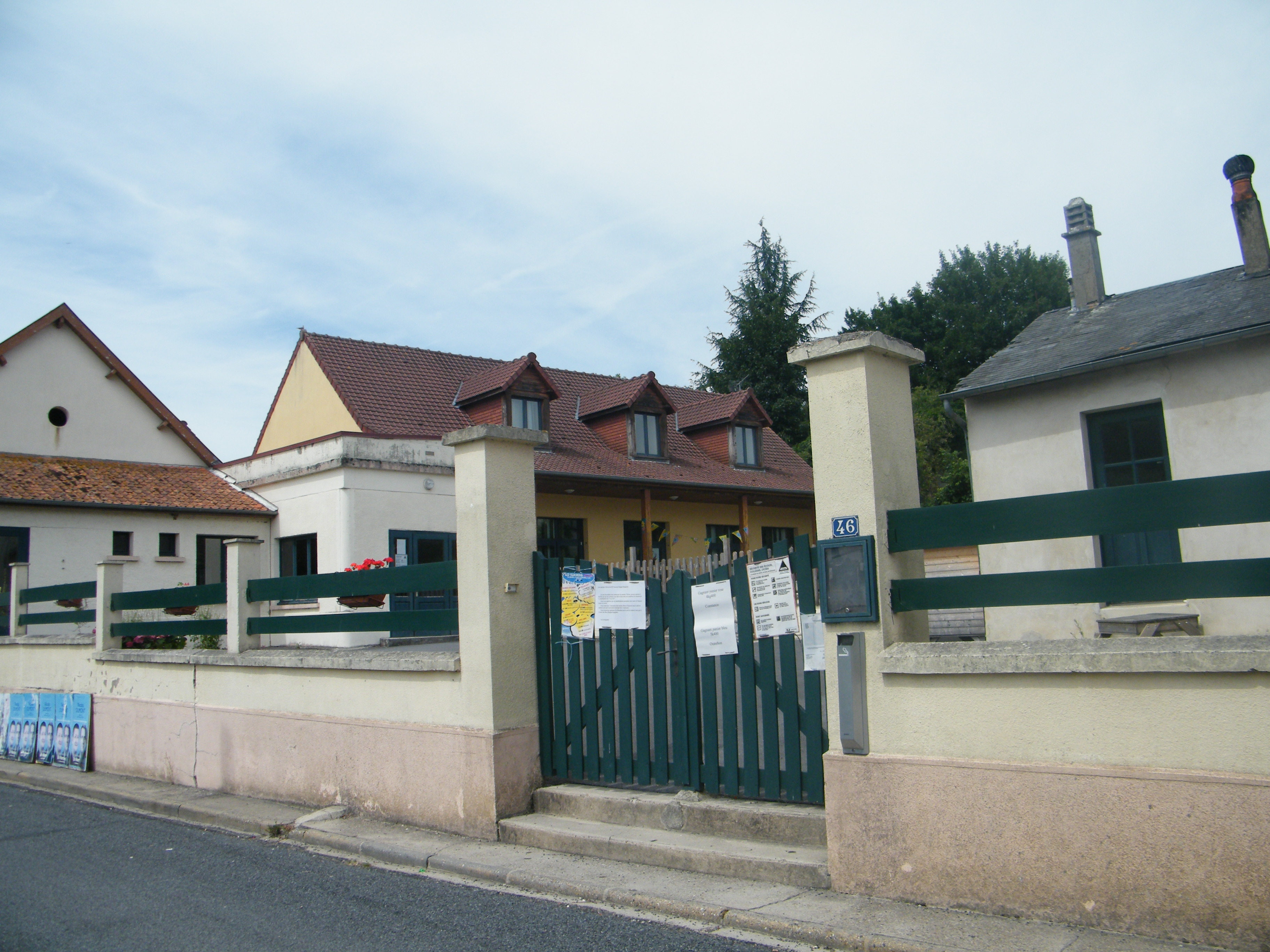 Eaucourt, Somme, école